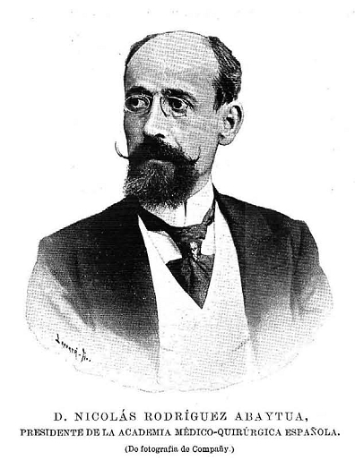 Retrato de Nicolás Rodríguez Abaytua, publicado en la revista española La Ilustración Española y Americana.